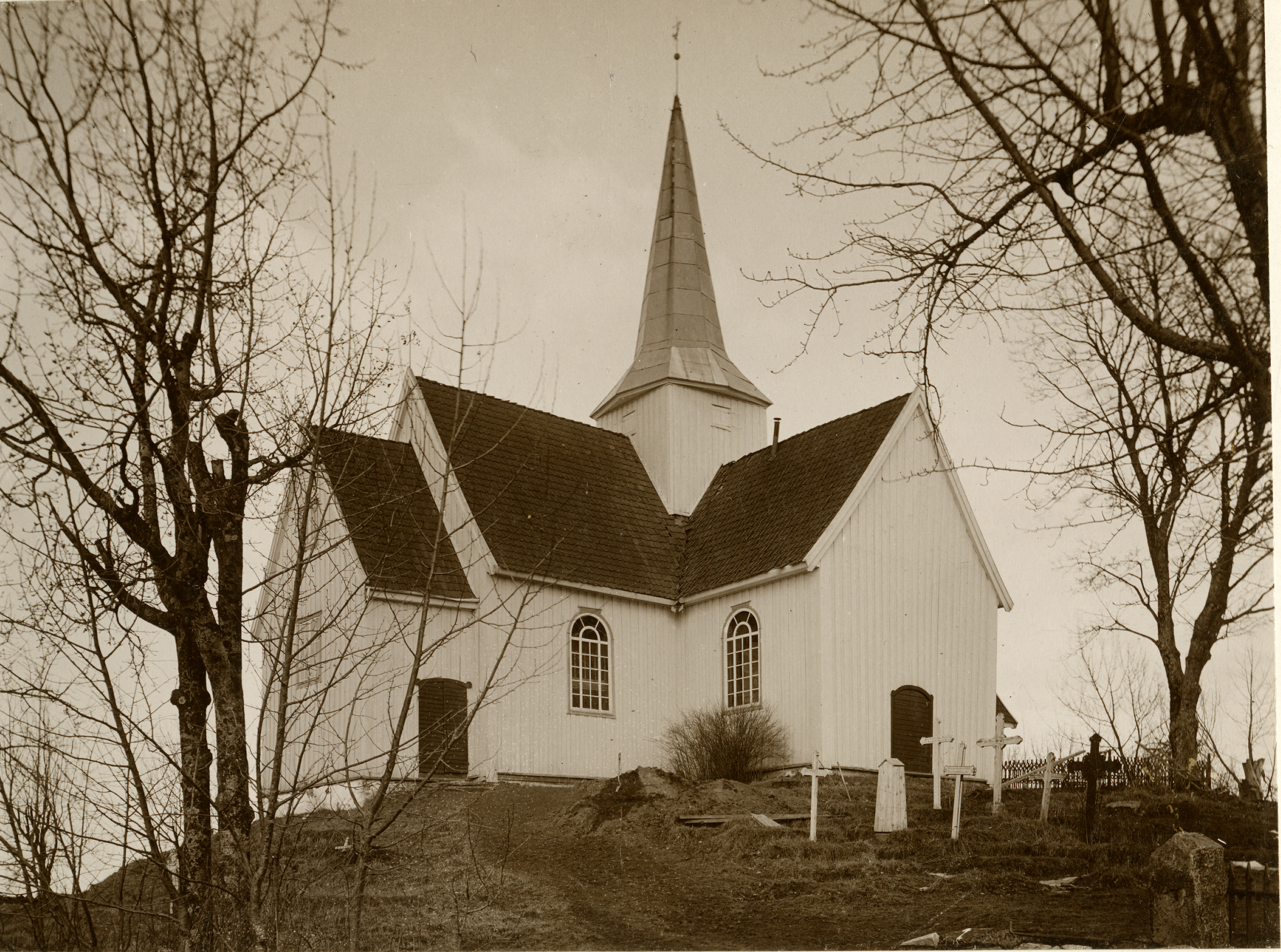 Gjerdrum kirke i Gjerdrum, Akershus